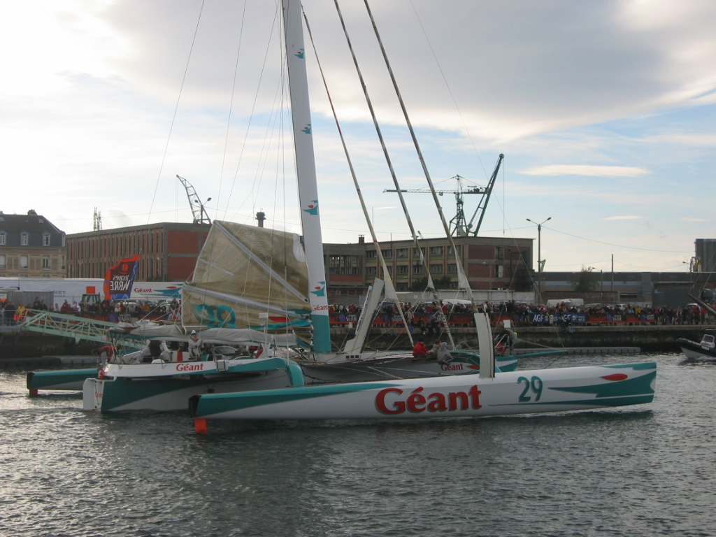 transat Jacques Vabre Le Havre-Salvador de Bahia 2005 Multicoque Géant Equipage : Michel Desjoyeaux & Hugues Destremau (France) Date : le jour du départ, dimanche 6 novembre 2005, Le Havre, bassin Paul Vatine Photographie prise par l'utilisateur Urban